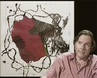 Portrait de André-Pierre Arnal